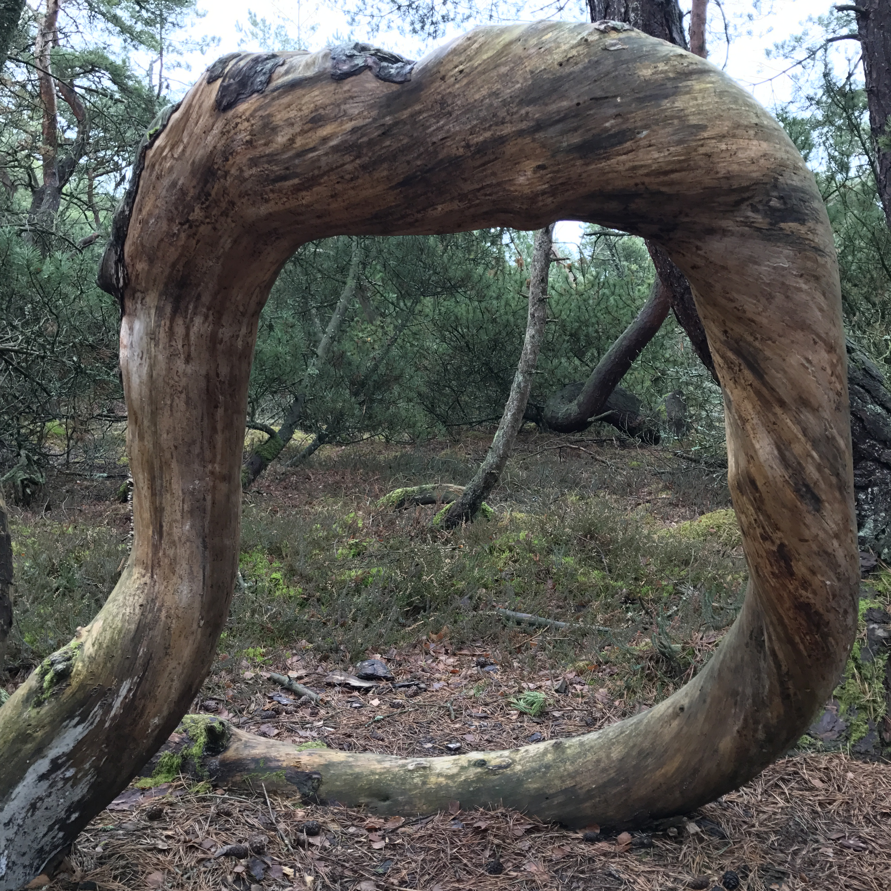 Trolltall i Haverdals naturreservat